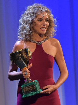 20743297423_7a12dc8346_o